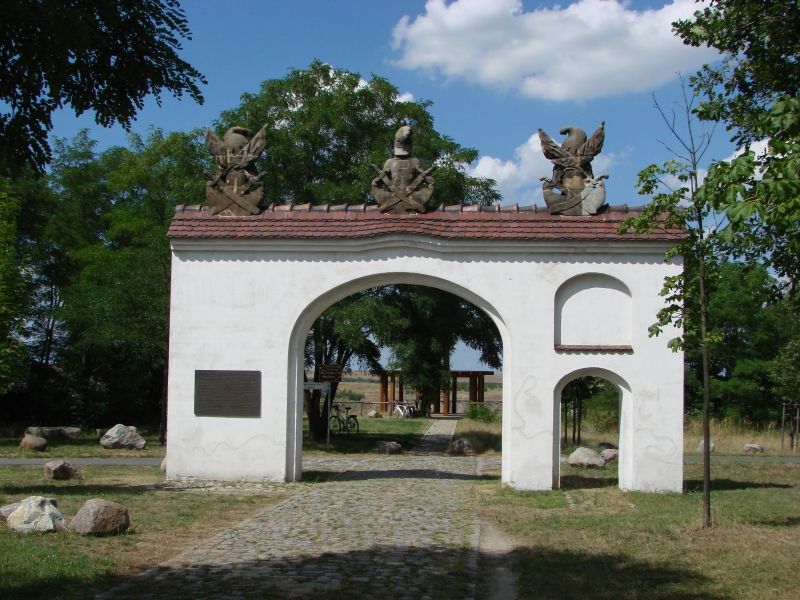 Das Raubrittertor in Klinge wurde nach der Devastierung des größten Teil des Dorfes wieder aufgebaut. Dargestellt ist die Rückseite mit der Texttafel.